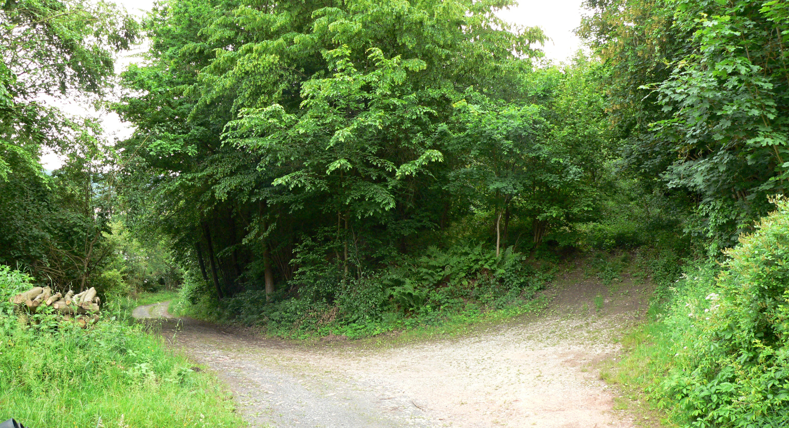 Standort des 1985 abgerissenen Hotel Andreesberg, von Bäumen überwuchert